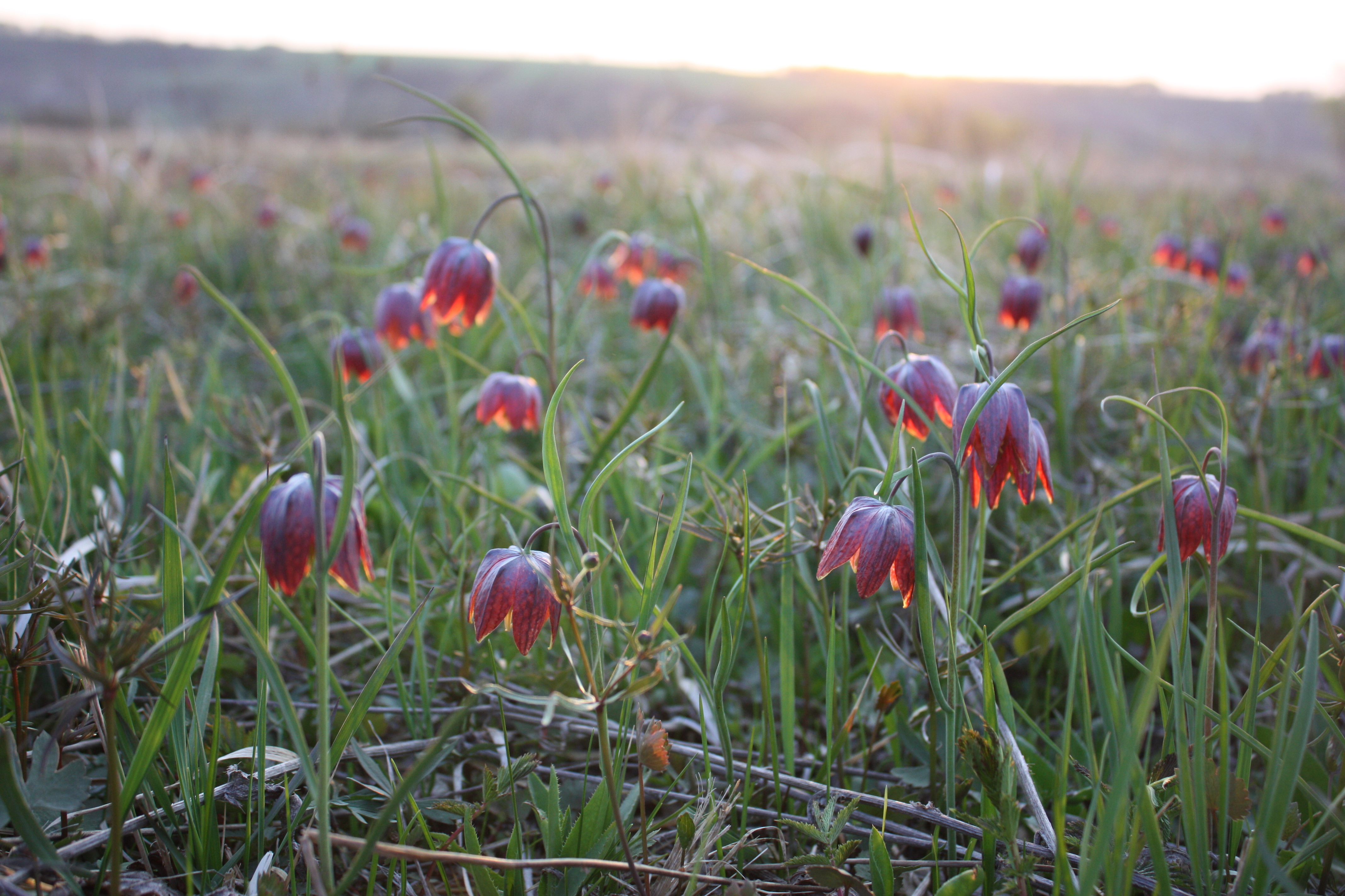 Тікичський, Катеринопільський район, смт. Катеринопіль